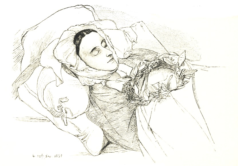 Die Schriftstellerin Amalie von Helvig (Amalie von Imhoff) auf dem Totenbett.